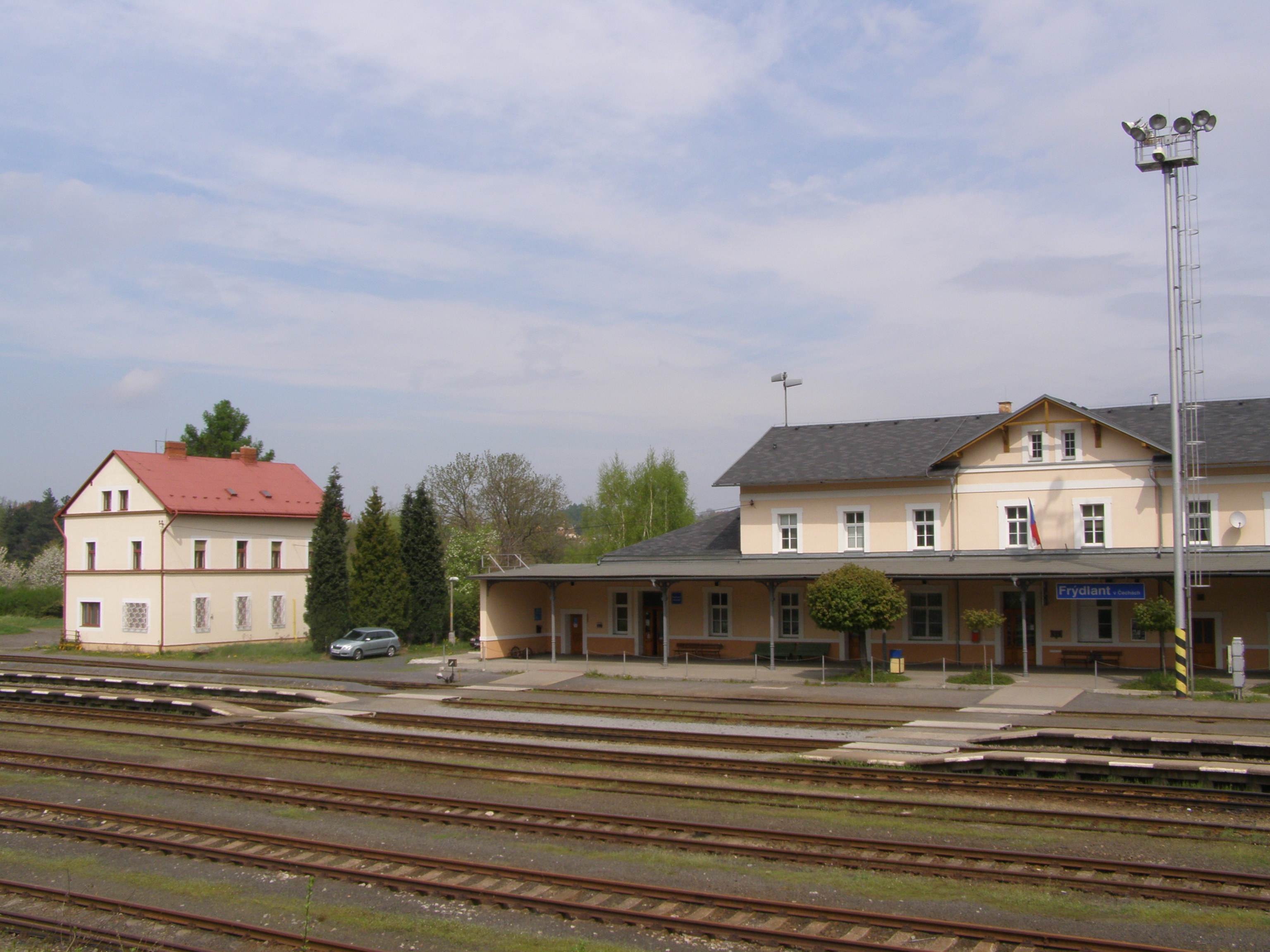 Frýdlant, železniční stanice